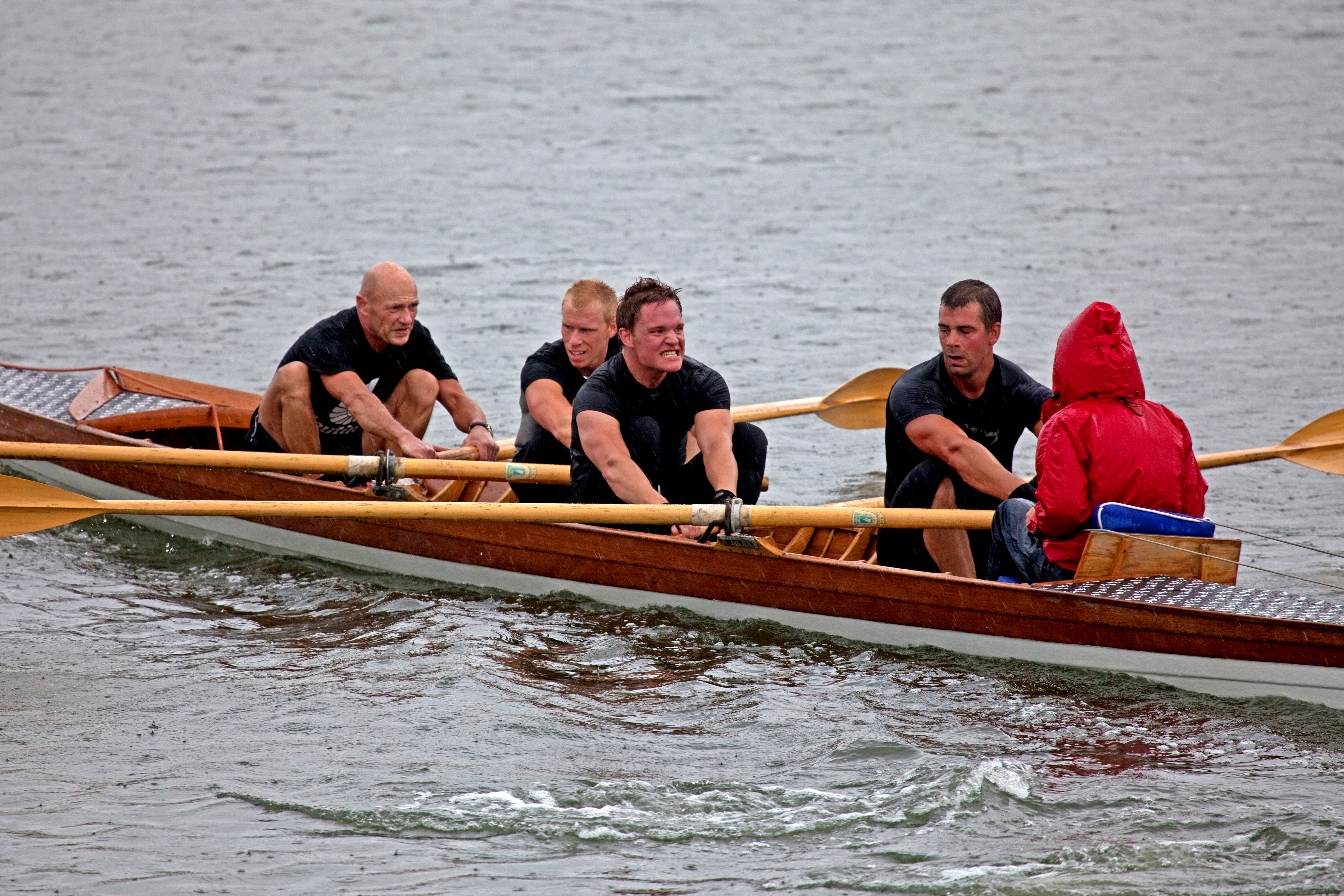 Inriggar roddtävling med hårda tag i envist regn